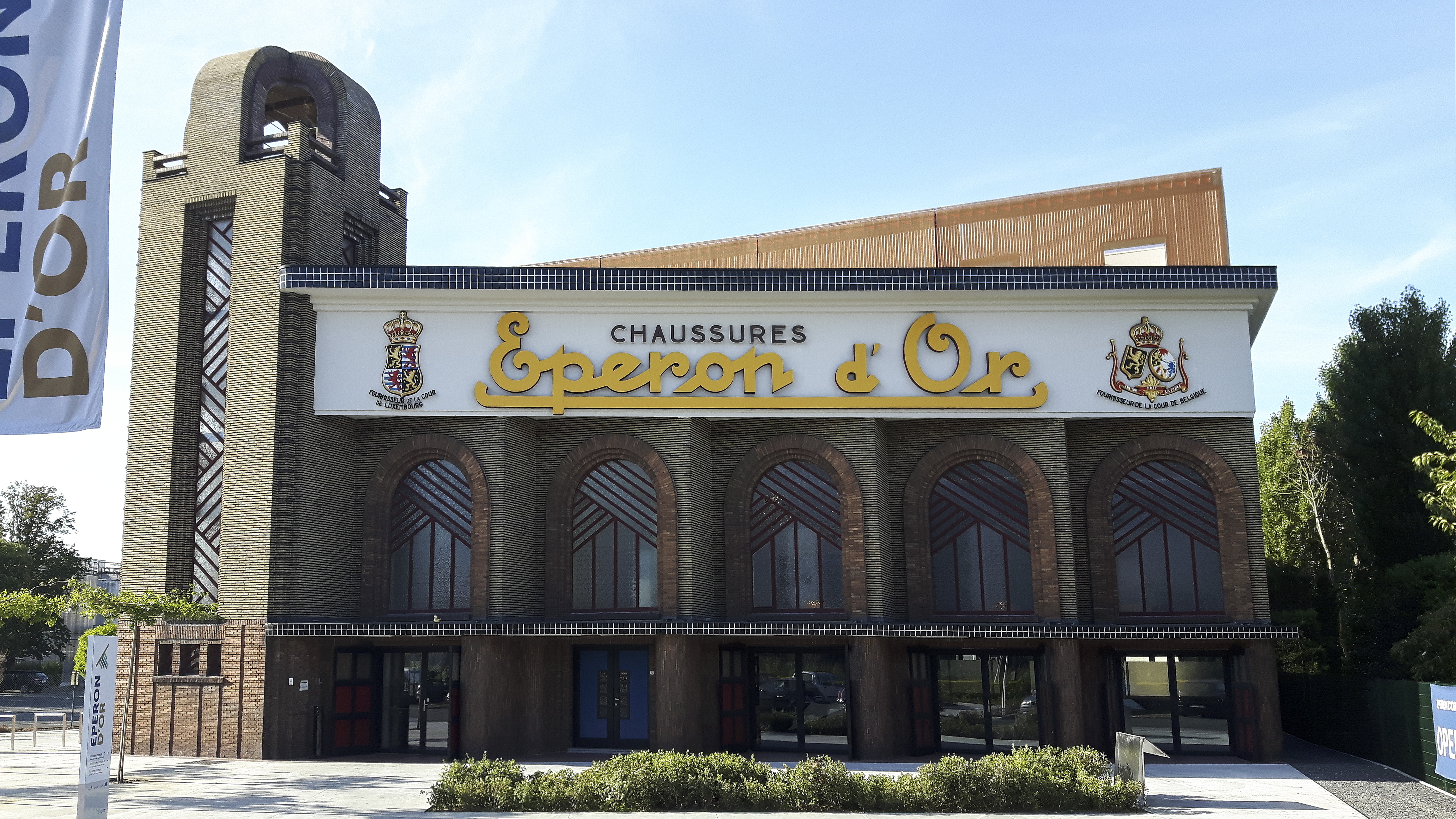 Foto voorkant Eperon d'Or